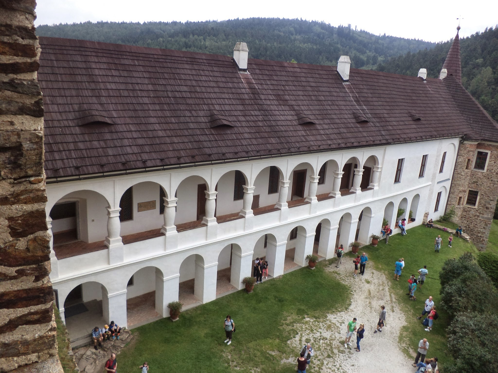 Hrad Velhartice. Okres Klatovy, Česká republika.